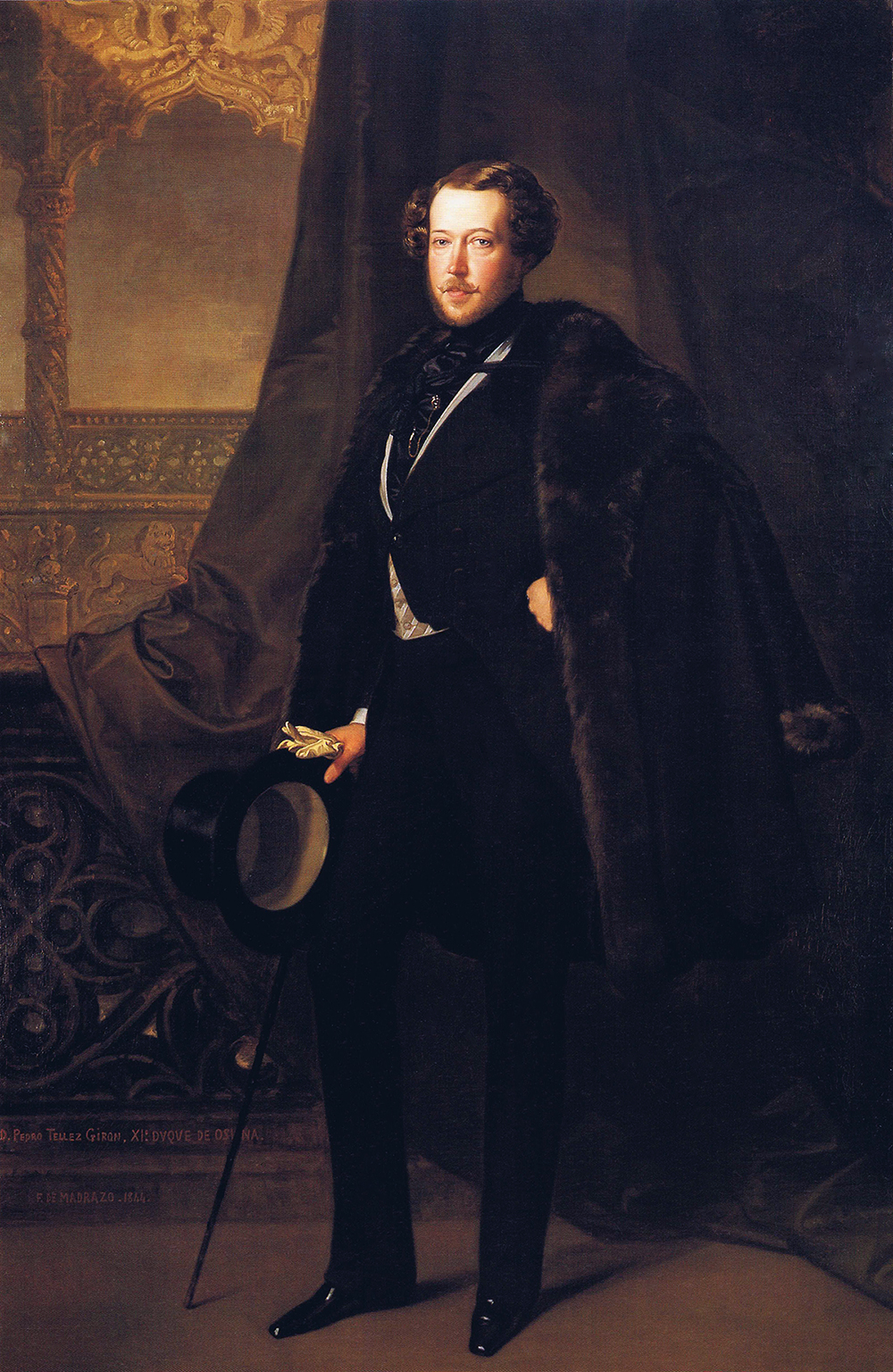 Retrato del aristócrata español Pedro de Alcántara Téllez-Girón y Beaufort Spontin (1810-1844), XI duque de Osuna y Grande de España.